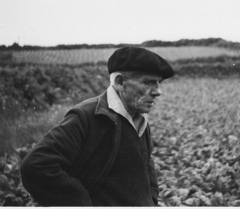 Fañch Elies e Penze da geñver Kamp Etrekeltiek ar Vrezhonegerien e 1960 e Plouenan, Bro Leon.